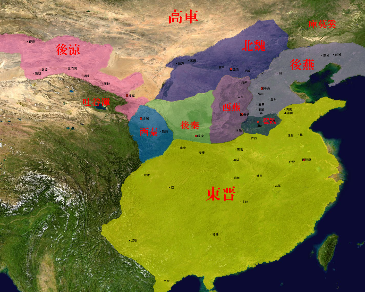 前秦の滅亡、後秦・翟魏の建国